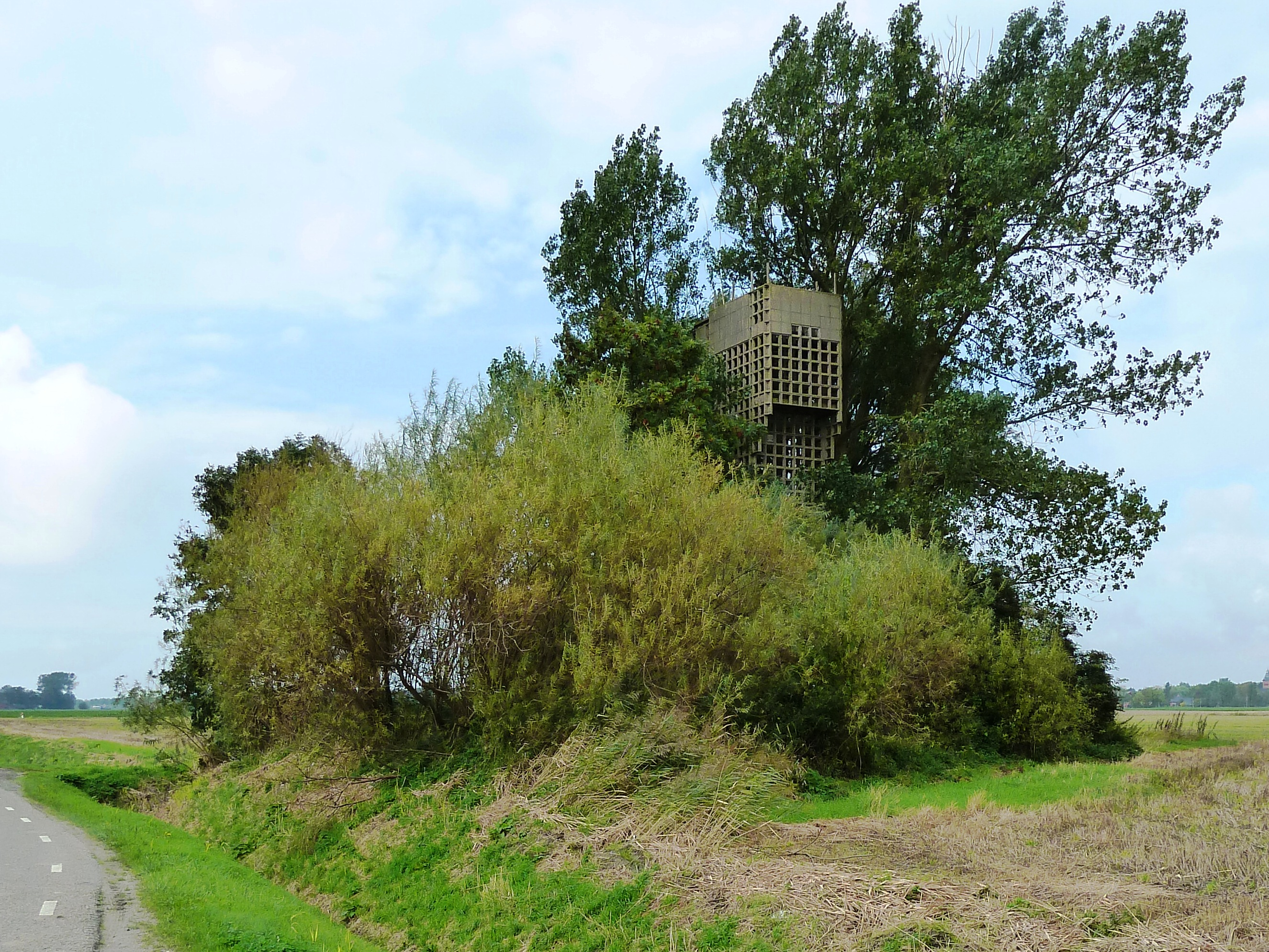 Luchtwachttoren bij het Groningse dorp Warfhuizen